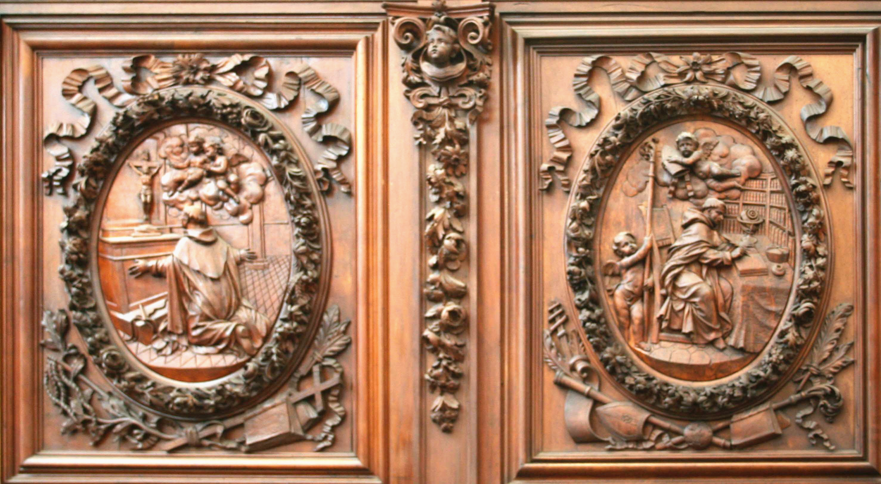 Boiseries du choeur de la basiliques de Saint-Maximin dans le département du Var en France. Sculptures réalisées en 1692 par le dominicain Vincent Funel. Elles représentent à gauche le bienheureux Henri Suso et à droite saint Albert le Grand.